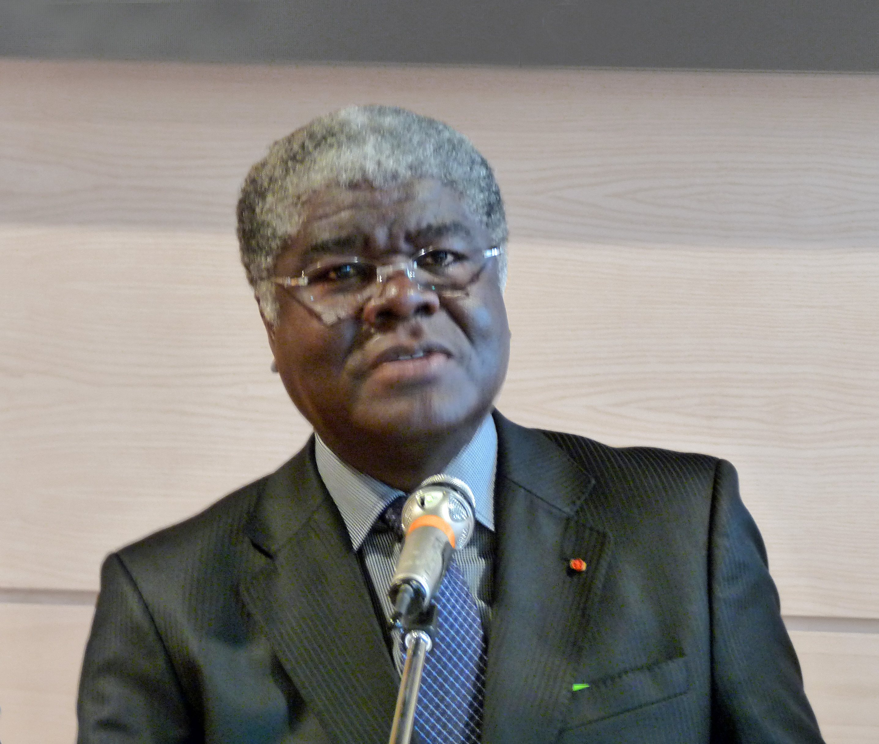 Robert Beugré Mambé, gouverneur du district d'Abidjan (Côte d'Ivoire), lors de sa conférence dans le cadre du Festival international de géographie de Saint-Dié-des-Vosges.